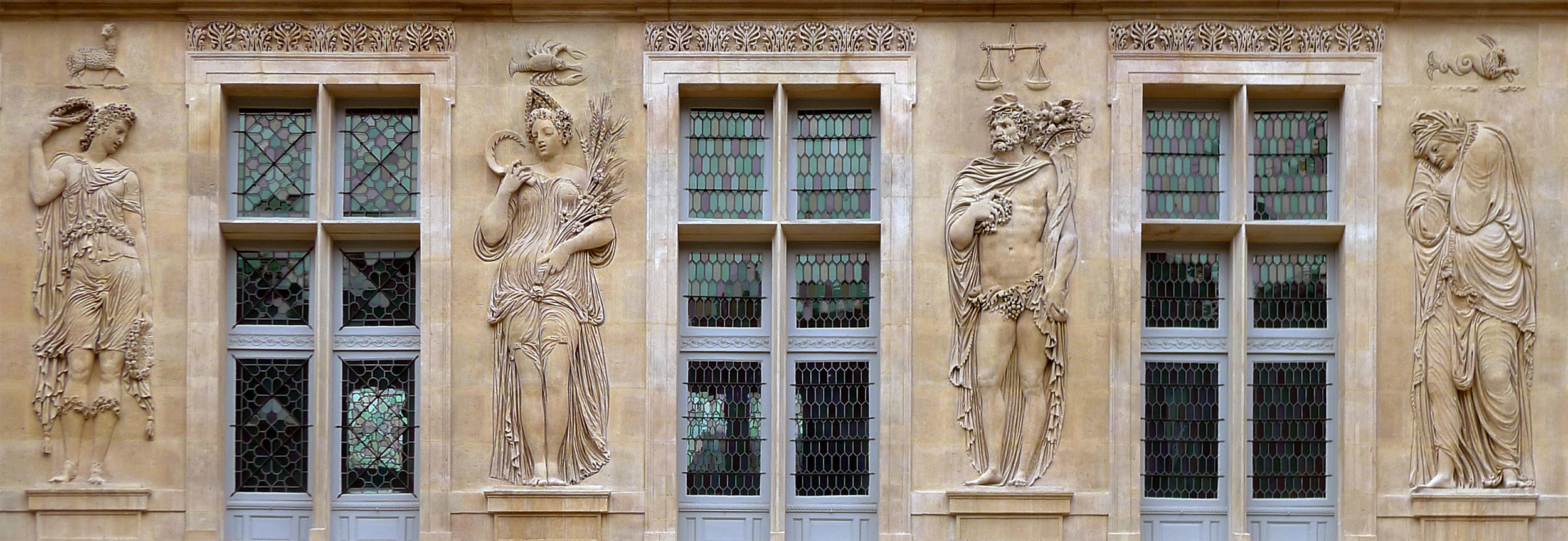 Bas-reliefs de Jean Goujon sur la façade de la cour d'entrée de l'hôtel Carnavalet (musée Carnavalet) - Paris III